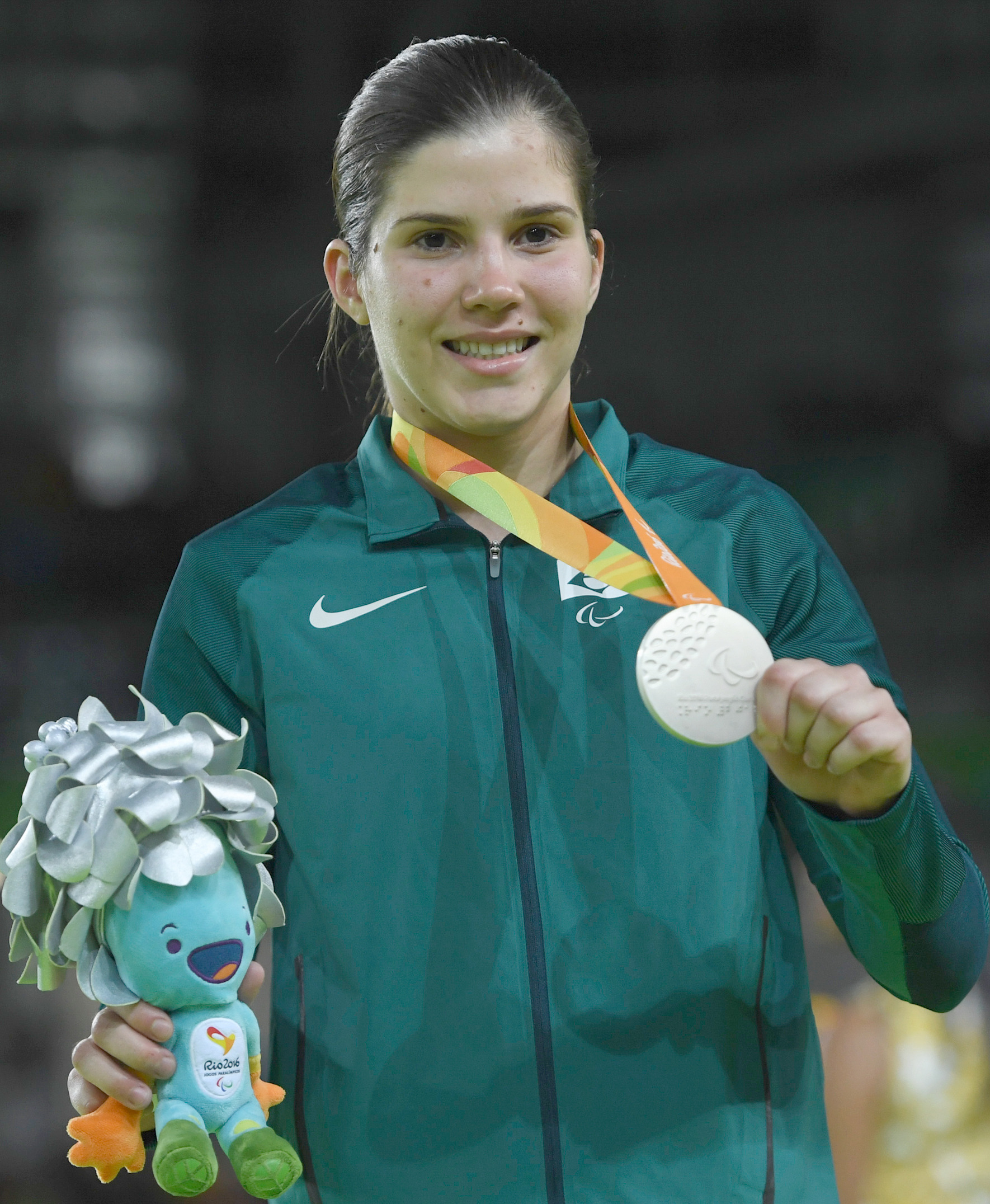 A brasileira Alana Martins Maldonado chora após perder por ippon para a mexicana Lenia F. Ruvalcaba Alvarez e fica com a medalha de prata na Paralimpíada Rio 2016